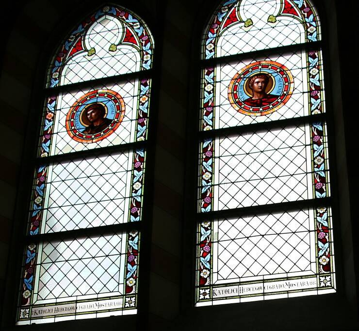 vitraj sarajevske katedrale kao dar Mostaraca